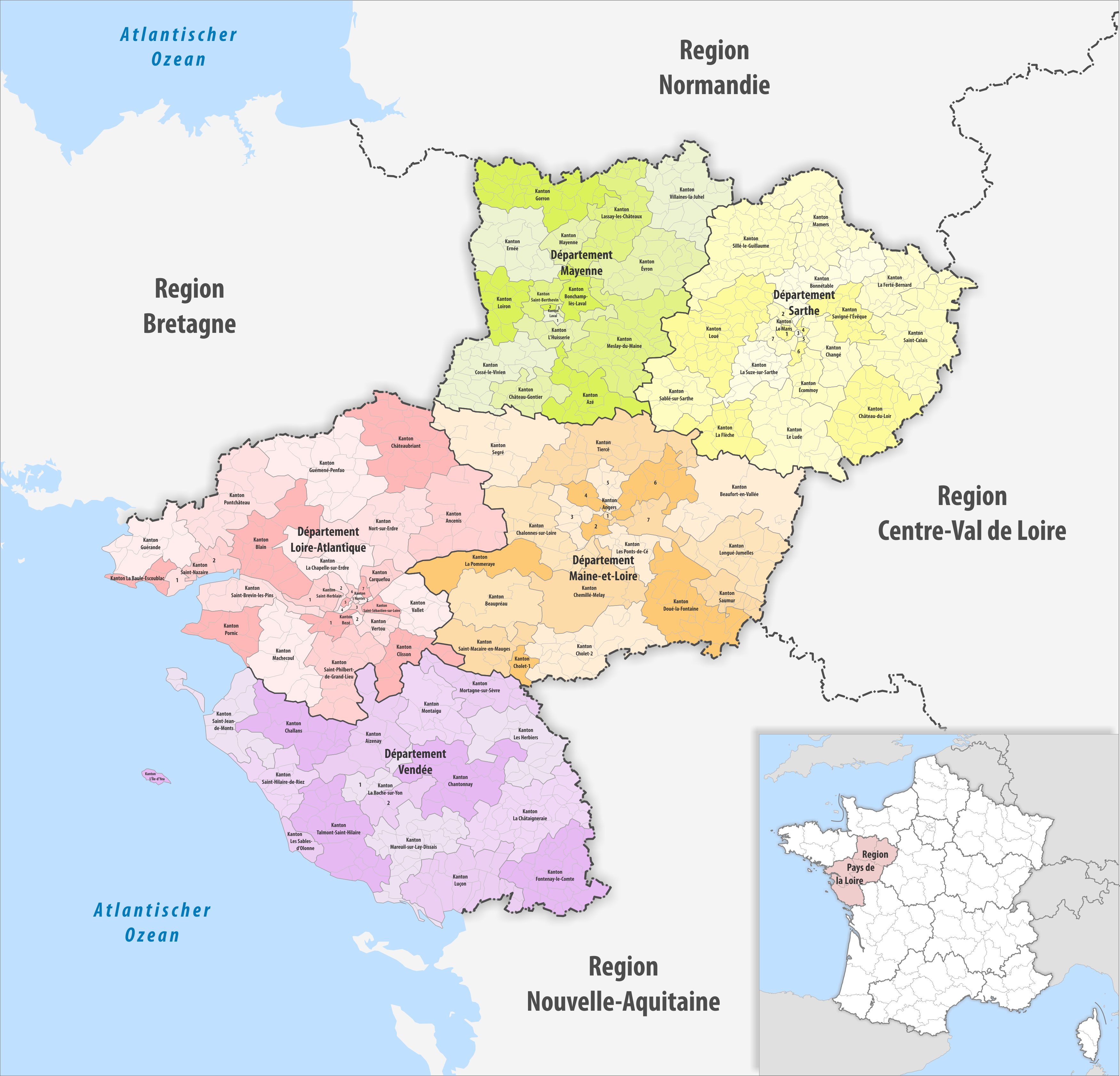 Gemeinden, Kantone und Departemente in der Region Pays de la Loire